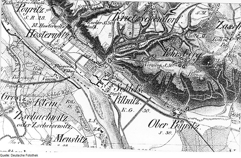 Original image description from the Deutsche Fotothek Dresden-Borsberg. Oberreit, Sect. Dresden, 1821/22